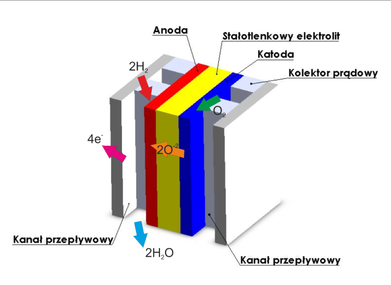 Ceramiczne tlenkowe ogniwo paliwowe (SOFC)